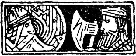 Gerhard Munthe: Illustration for Eiriksønnenes saga. Snorre 1899-edition. vignett 4